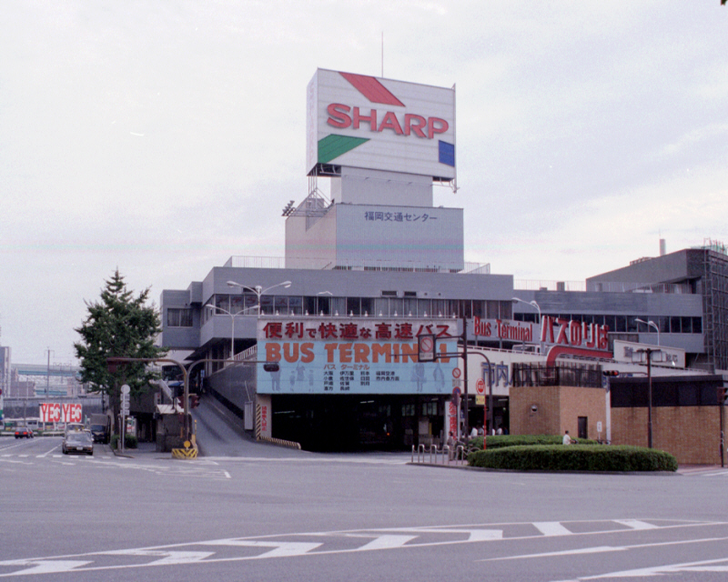 2003年9月撮影